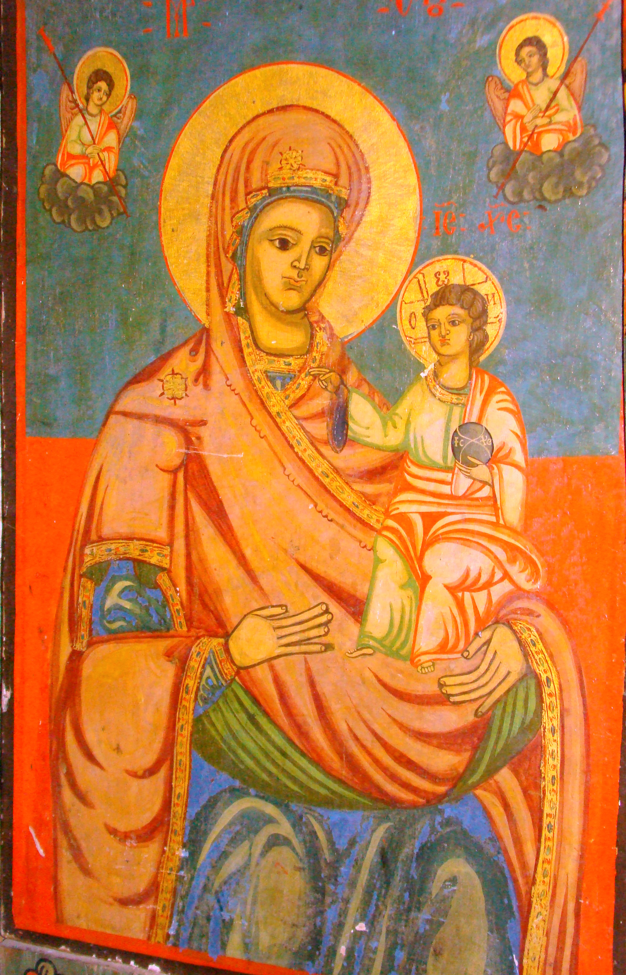 Biserica de lemn „Sfântul Gheorghe”, sat Turtaba, județ Mehedinți